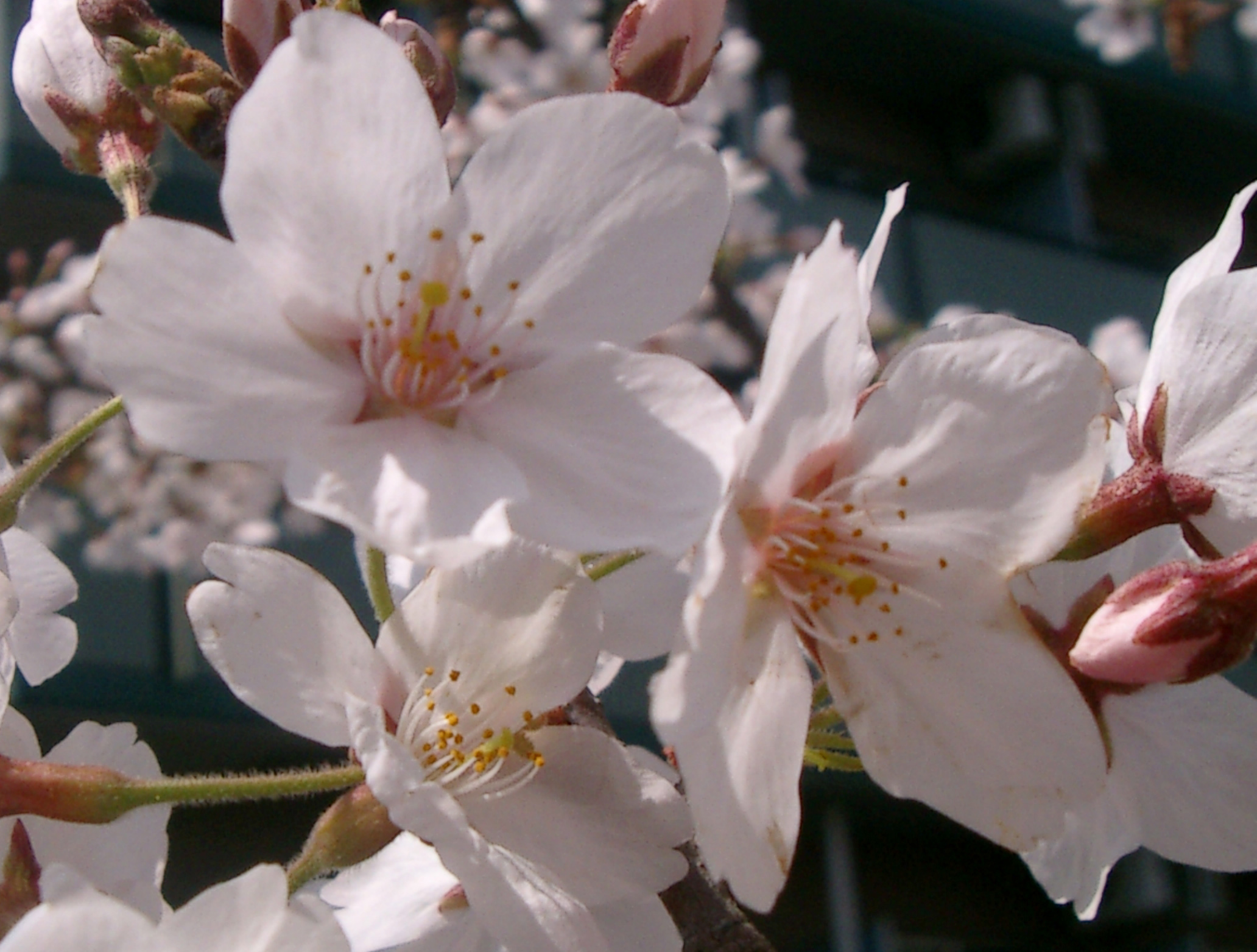 妩樱。 樱花花期很短且经不起风吹雨打。与浪漫相比樱花更是妩媚的。满开时的樱花犹如低头羞却的少女令人钟情，而飘落而去的樱花却又令人相惜。但也好，这样会留给人们一个期待，期待着来年再次与樱的相遇。 （taken by myself.10.05.2005）